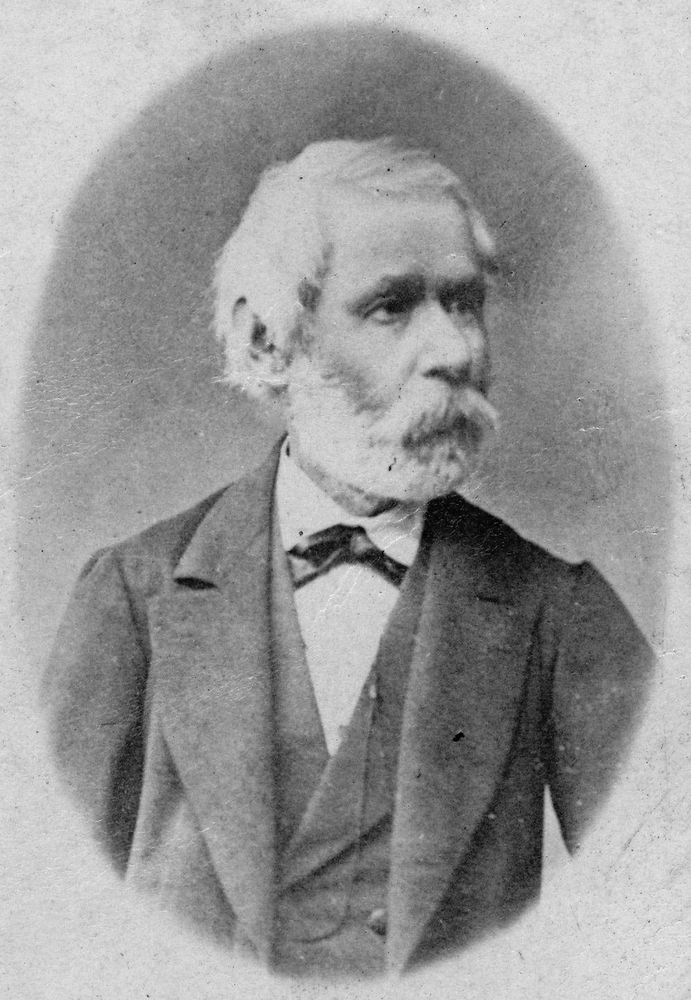 Arany János Ellinger Ede fényképén